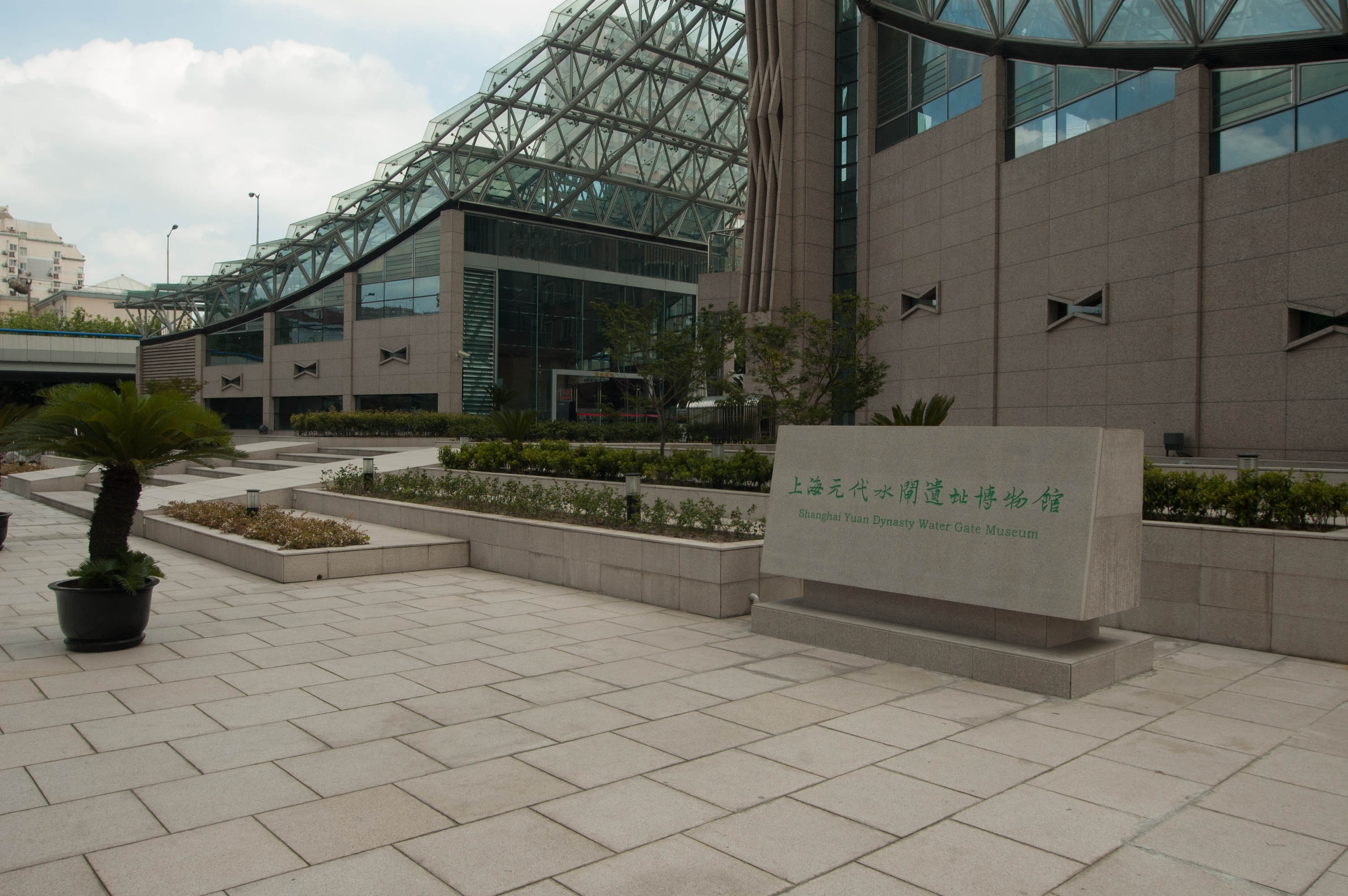 上海元代水闸遗址博物馆